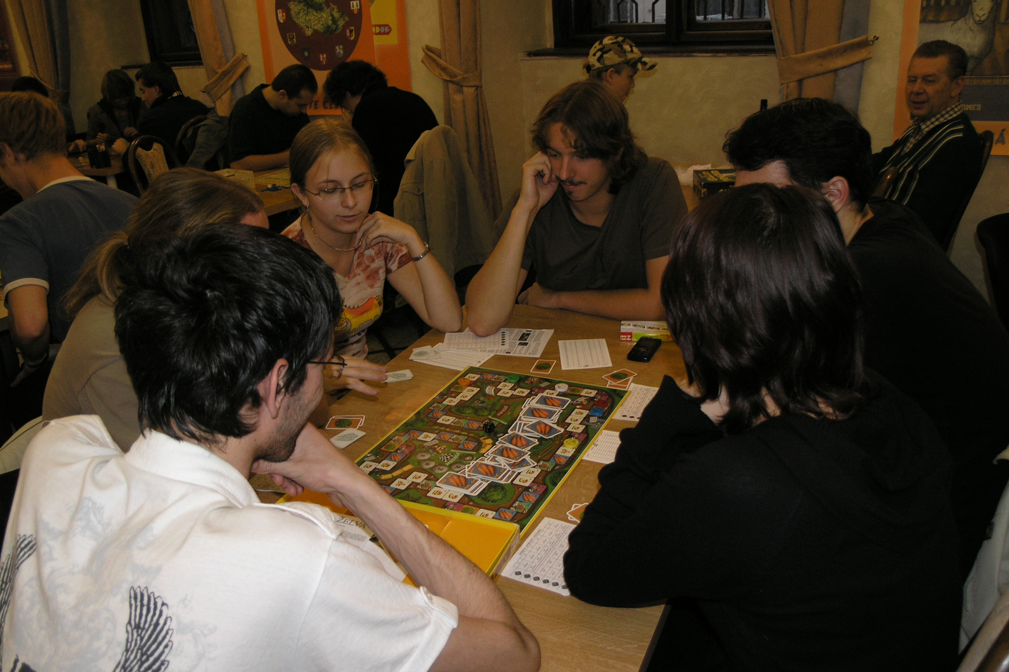 Herní festival Deskohraní 2008 - Zajíc a želva